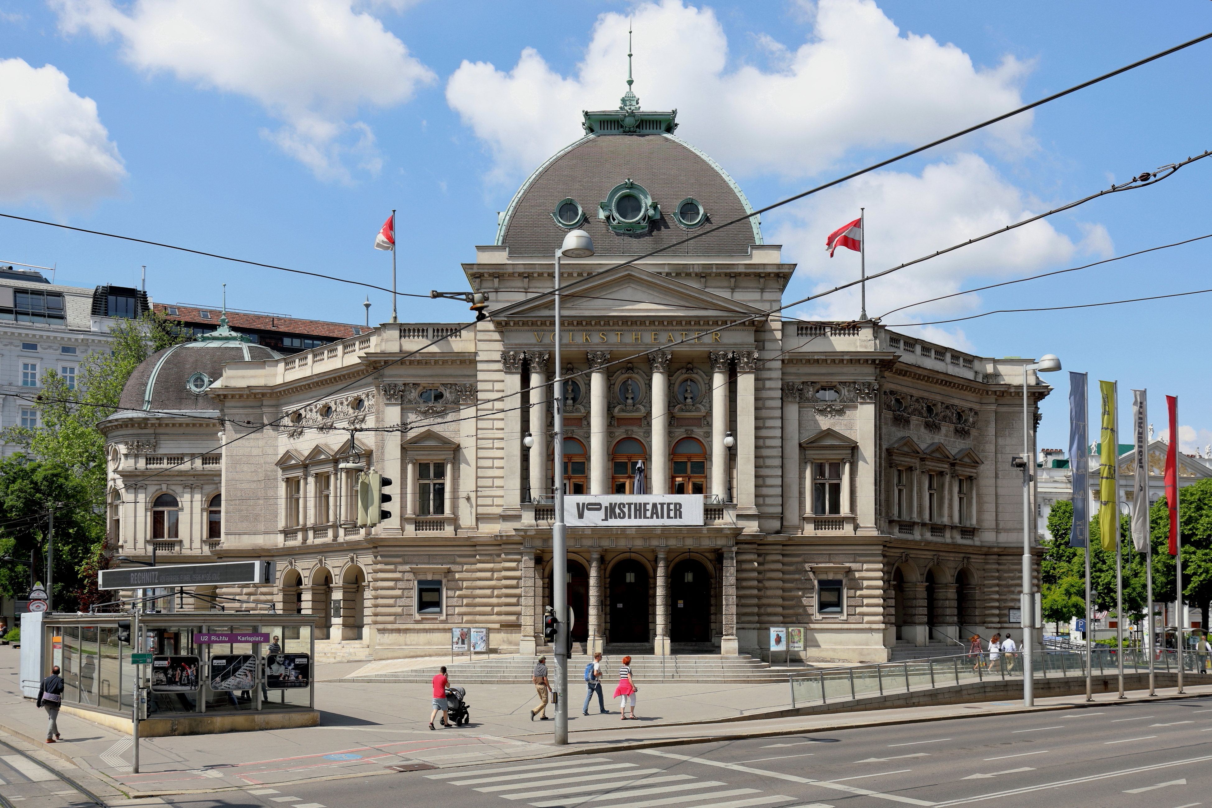 Ostansicht des Volkstheater am Arthur-Schnitzler-Platz im 7. Wiener Gemeindebezirk Neubau.Das Theater wurde ab 1887 nach Plänen von Hermann Helmer und Ferdinand Fellner in Neorenaissanceformen errichtet und am 14. September 1889 mit Ludwig Anzengrubers Schauspiel „Der Fleck auf der Ehr’“ als Deutsches Volkstheater eröffnet. Über dem Hauptportal befinden sich die Büsten von Ferdinand Raimund, Johann Nestroy und Franz Grillparzer. Diese wurde im Zuge der Generalsanierung 1989 angebracht. Ursprünglich gab es welche von Friedrich Schiller, Gotthold Ephraim Lessing und Grillparzer.